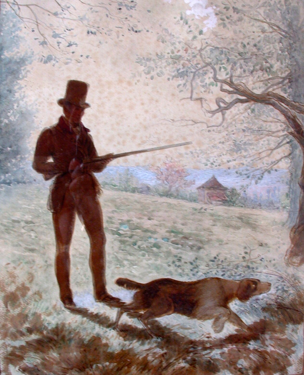 Chasse dans le Périgord par Fournery